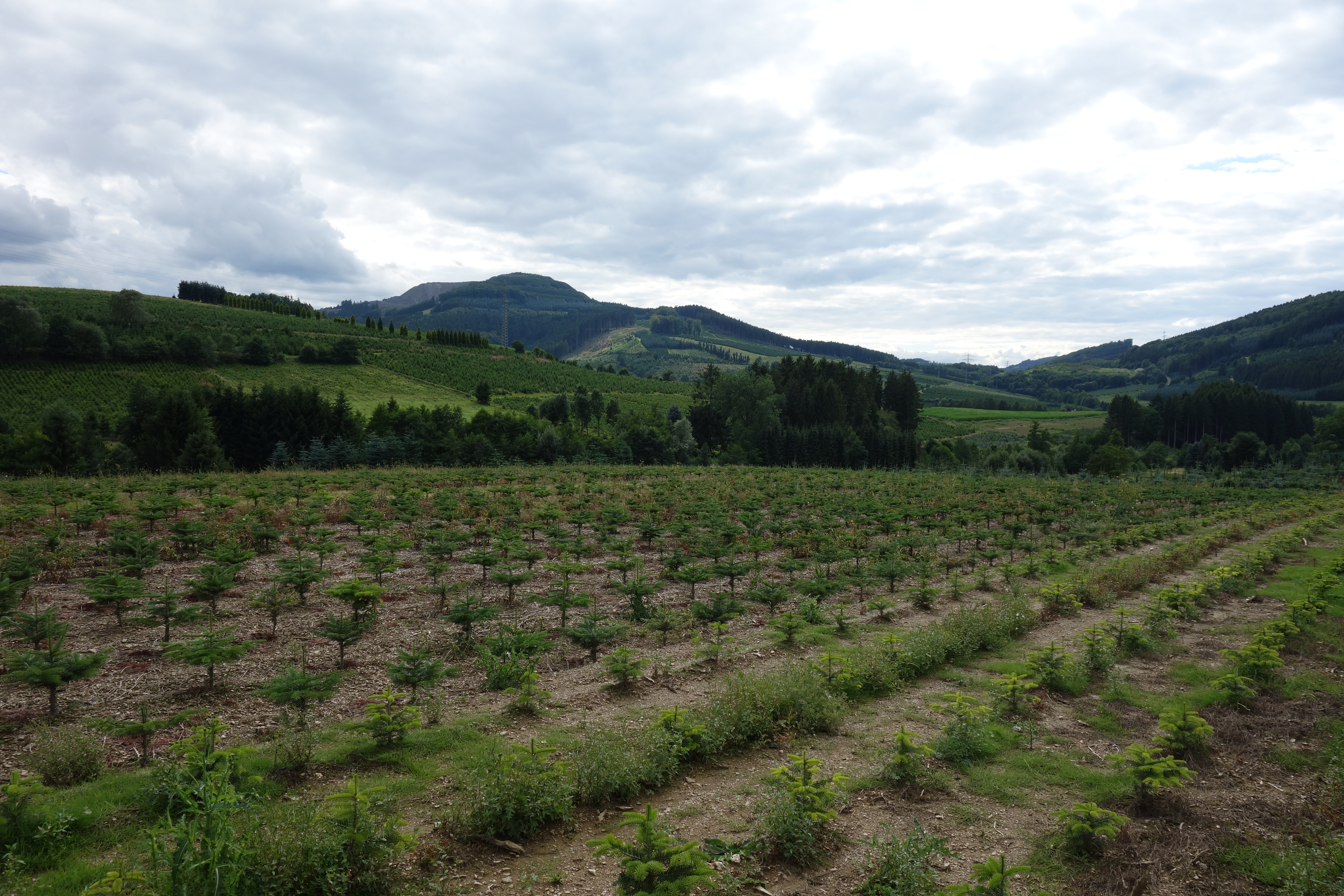 Landschaftsschutzgebiet Bestwig von Straße Herringhausen nach Gevelinghausen aufgenommen.